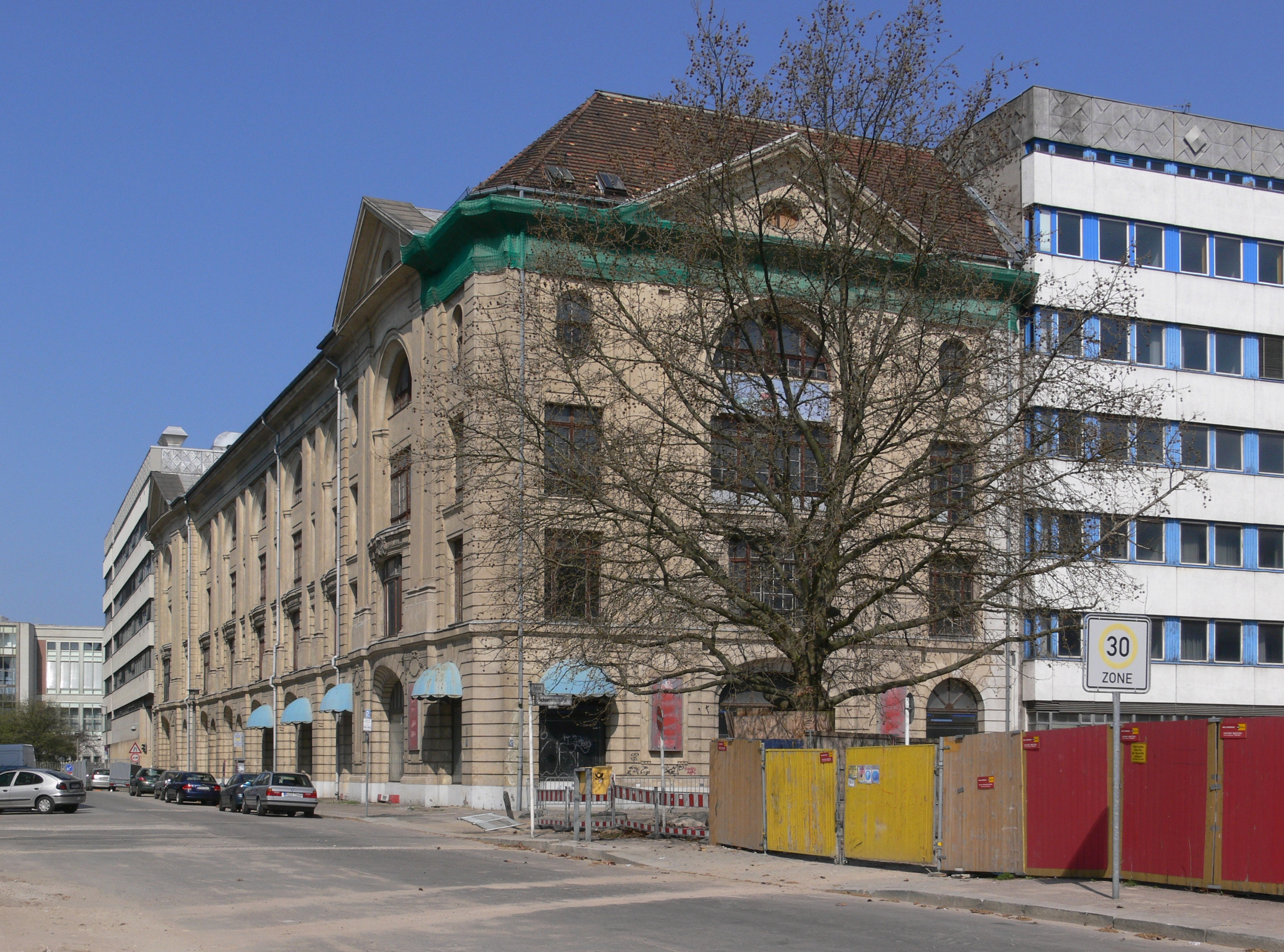 Berlin-Mitte, Brüderstraße, Gebäude des ehem. Warenhauses Rudolph Hertzog